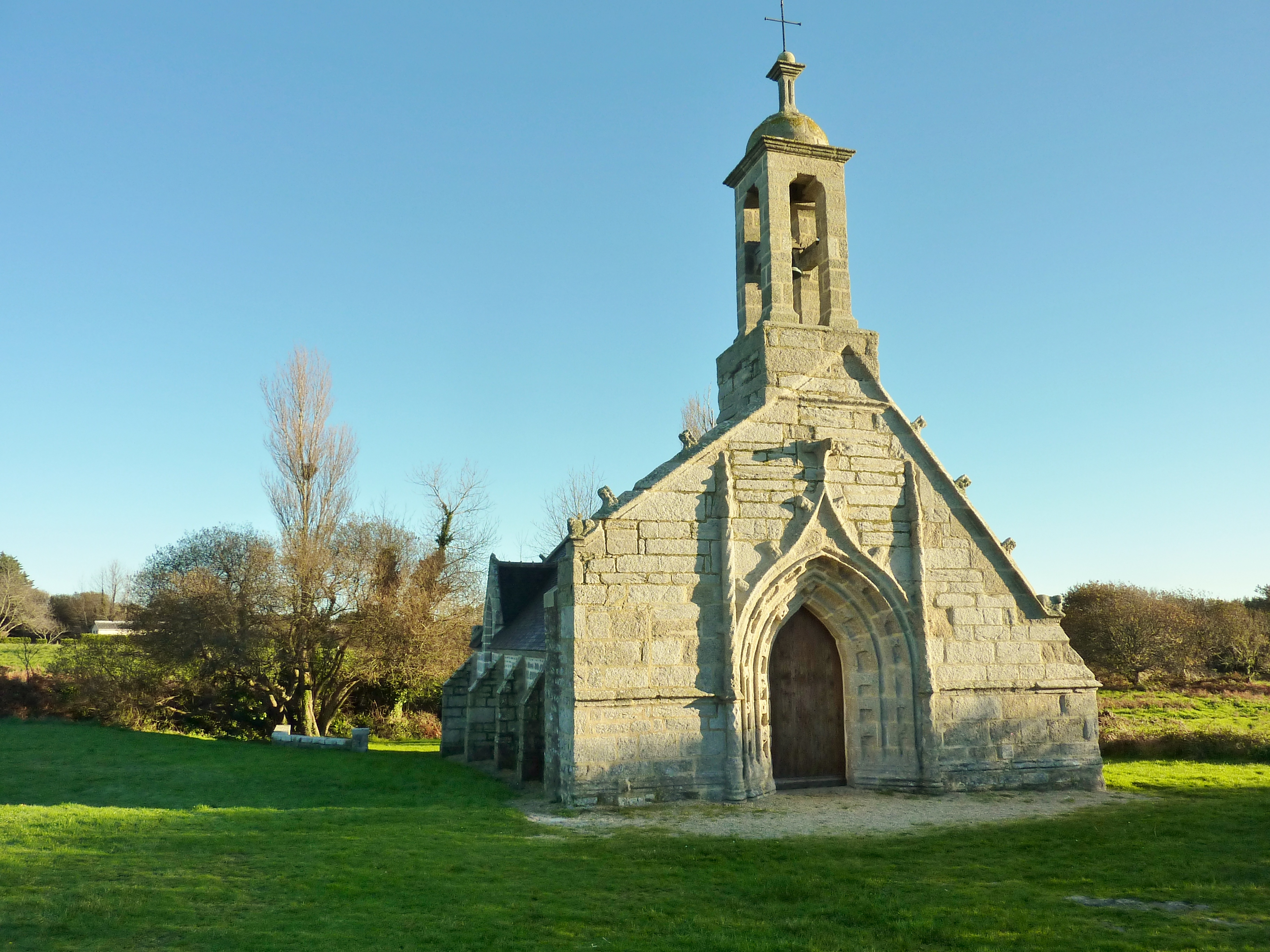 Treffiagat : la chapelle Saint-Fiacre (style gothique flamboyant, XVe-XVIe siècles)